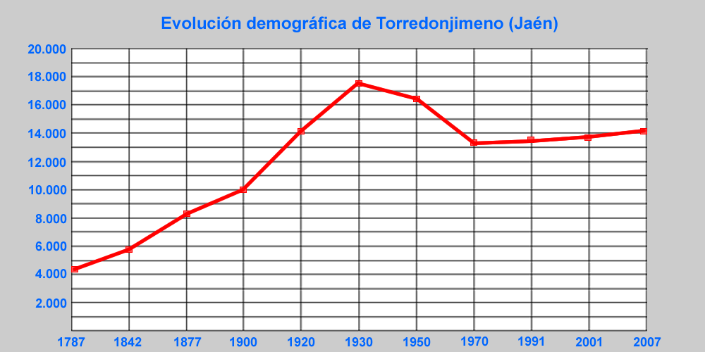 Evolución demográfica de Torredonjimeno (1787-2007)